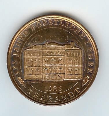 The Academy of Forestry of Tharandt, founded by Johann Heinrich Cotta (1763-1844) in 1811, on a 1986 medal celebrating 175 years of forest science in Tharandt. / Die Forstakademie Tharandt, 1811 gegründet von Johann Heinrich Cotta (1763-1844), auf einer Gedenk-Medaille von 1986 zur Feier von "175 Jahre forstlicher Lehre in Tharandt" (Vorderseite). (Rückseite zeigt ein Bildnis Cottas).